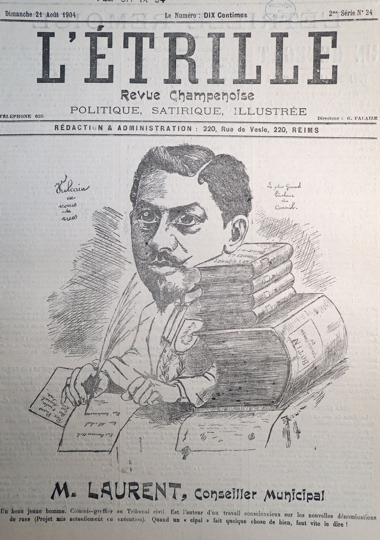 le journal l'étrille dans les fonds de la bibliothèque municipale de Reims.